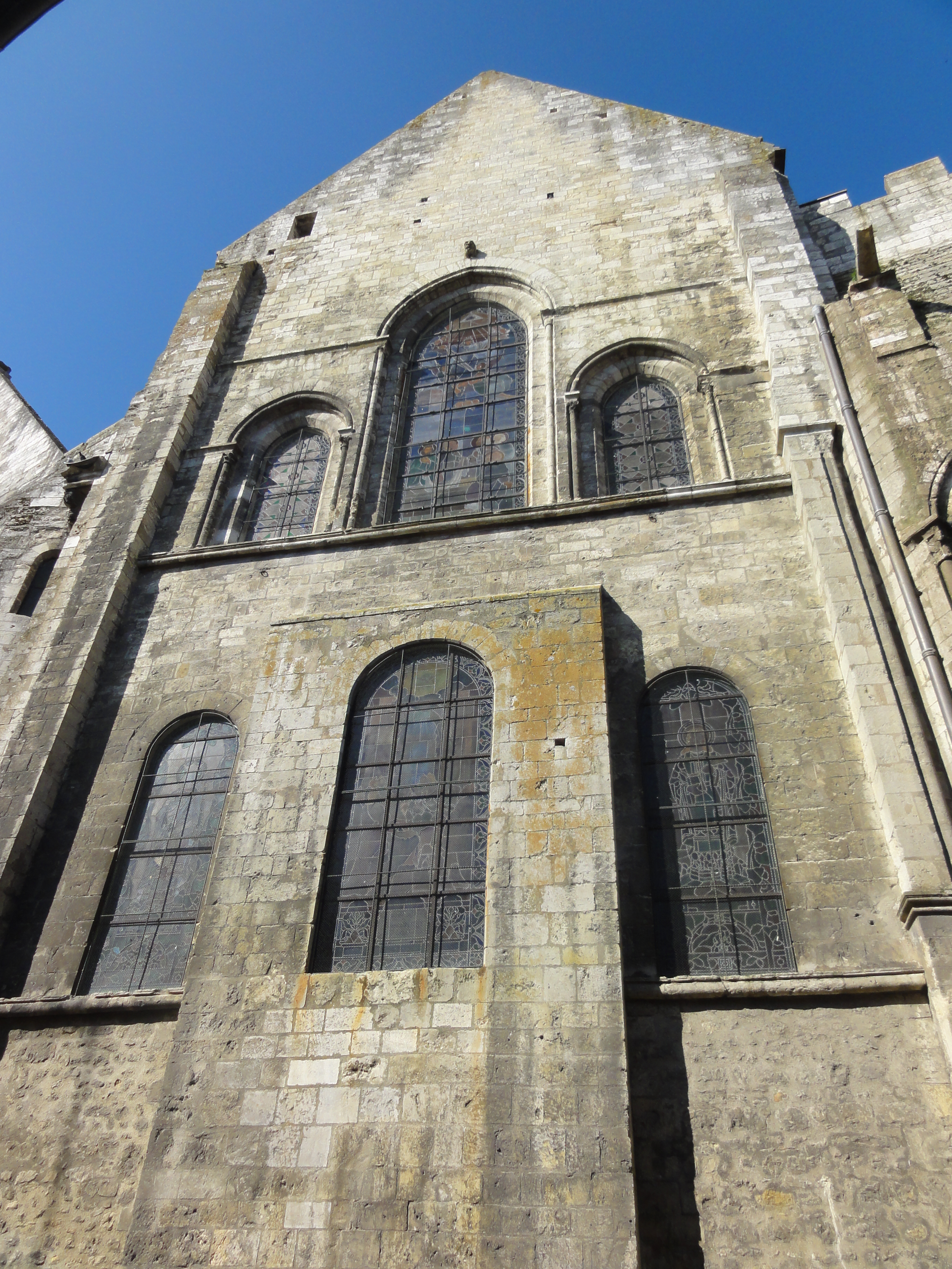 Étampes (91), collégiale Notre-Dame du Fort, chevet.